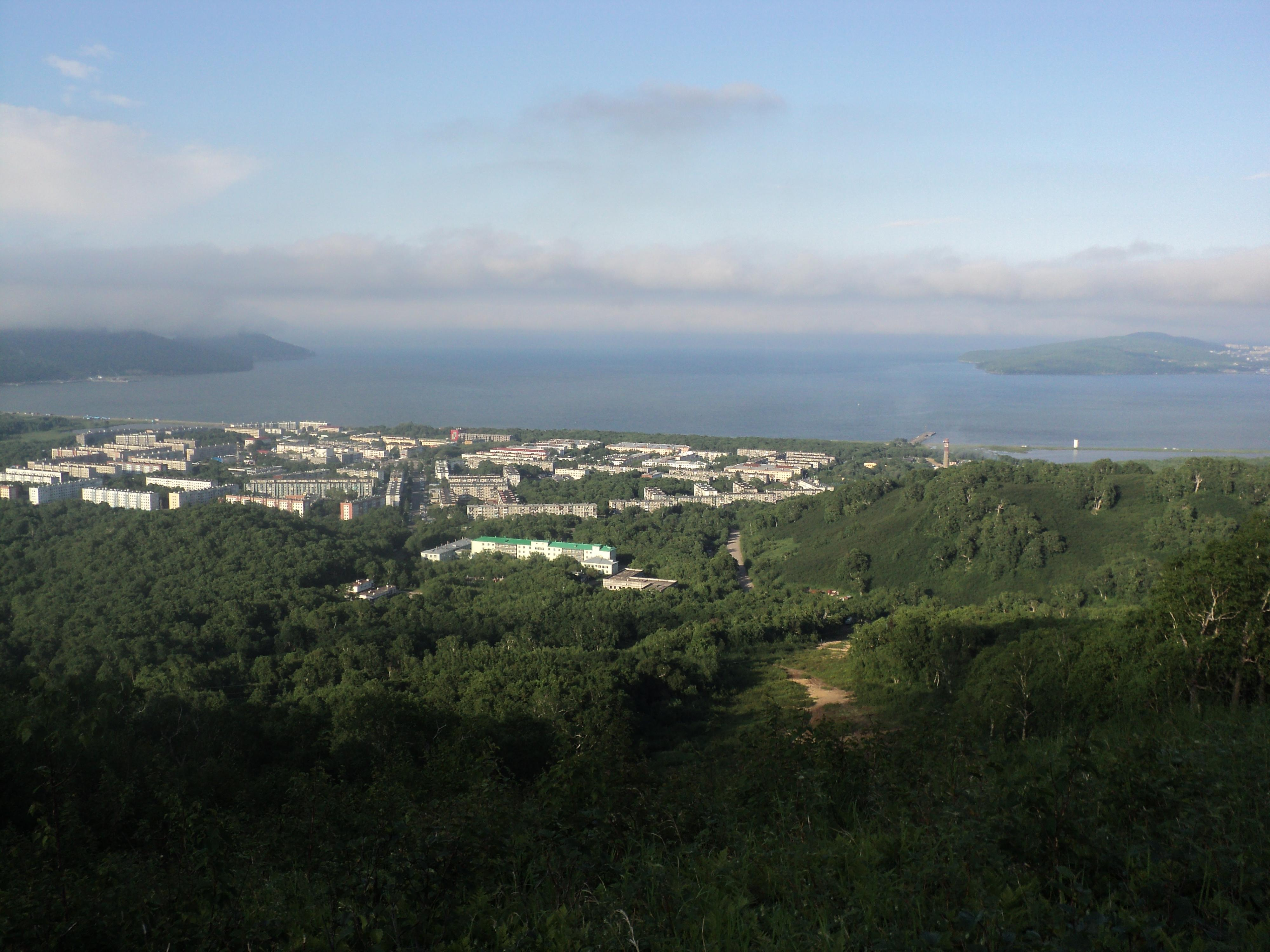 город Вилючинск Камчатский край вид с сопки